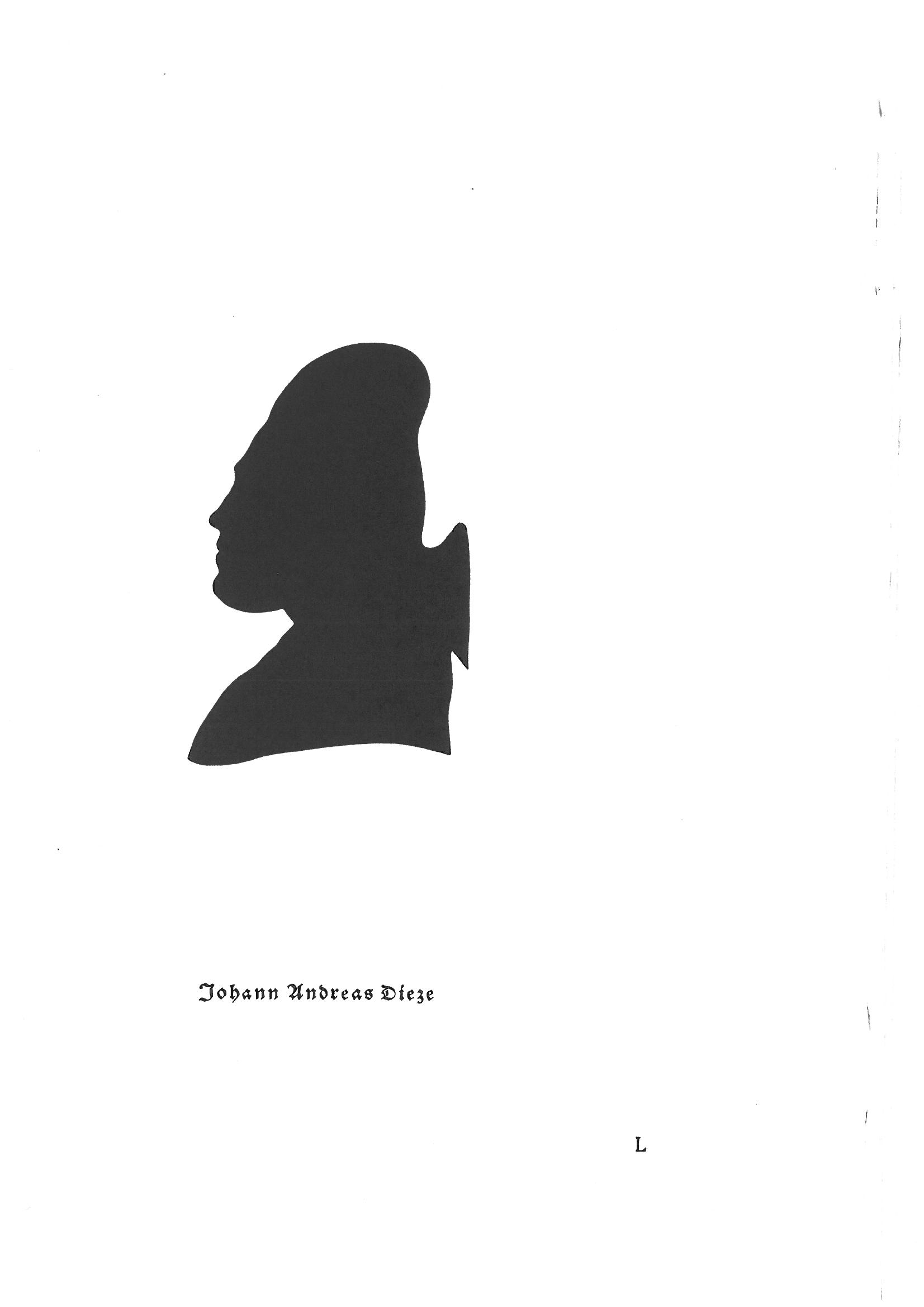 Schattenriss des Bibliothekars Johann Andreas Dietze (1729-1785) in der Silhouetten-Sammlung Schubert Tafel L Authority control VIAF: 24940916 LCCN: 91025566[does not match ^[ns][broshj]?%d%d%d%d%d%d%d%d%d?%d?$ pattern] GND: 100107338 WorldCat